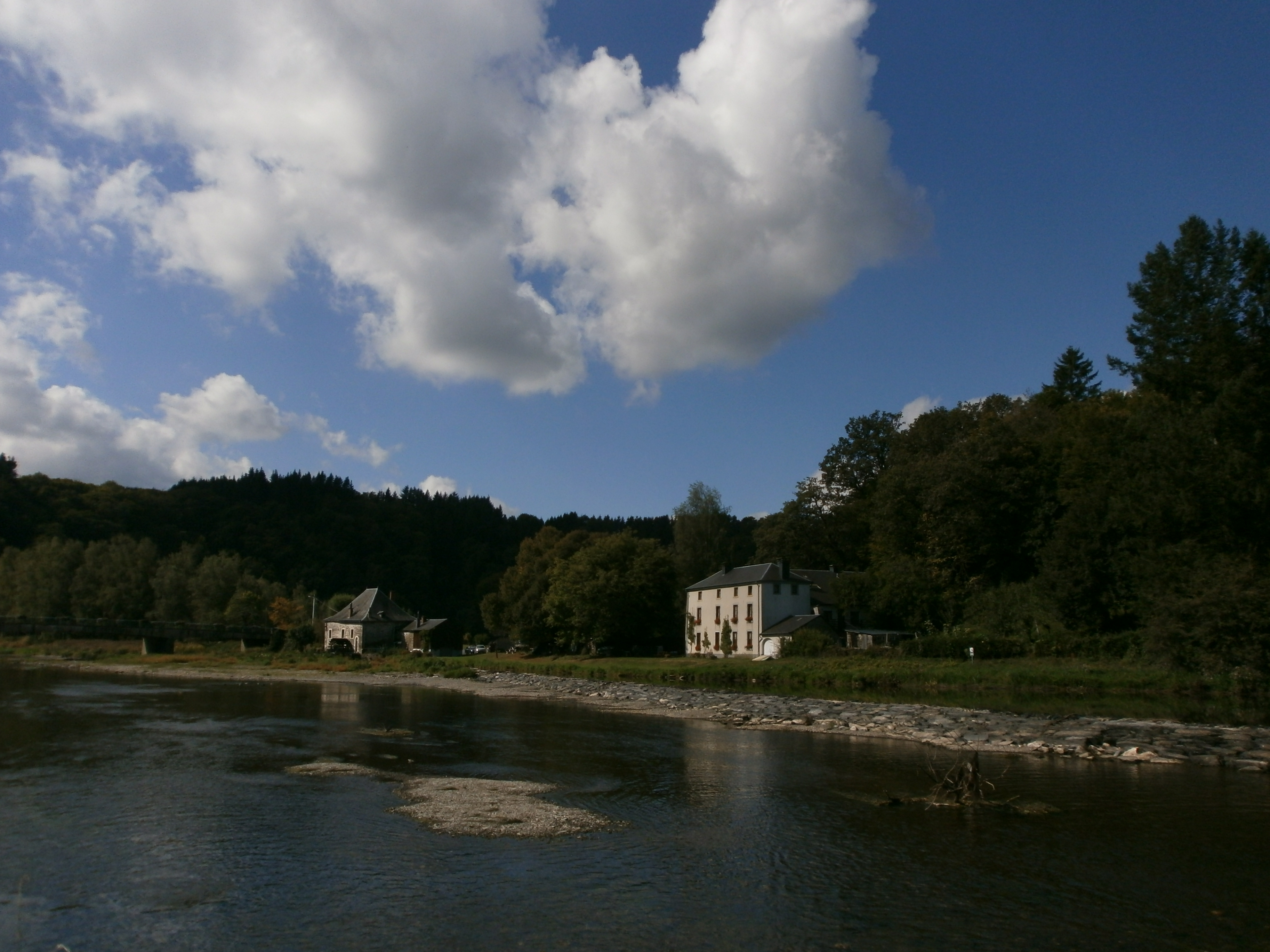 à gauche moulin à eau, en activité - ancienne ferme, actuellement gîte rural, au bord de la Semois